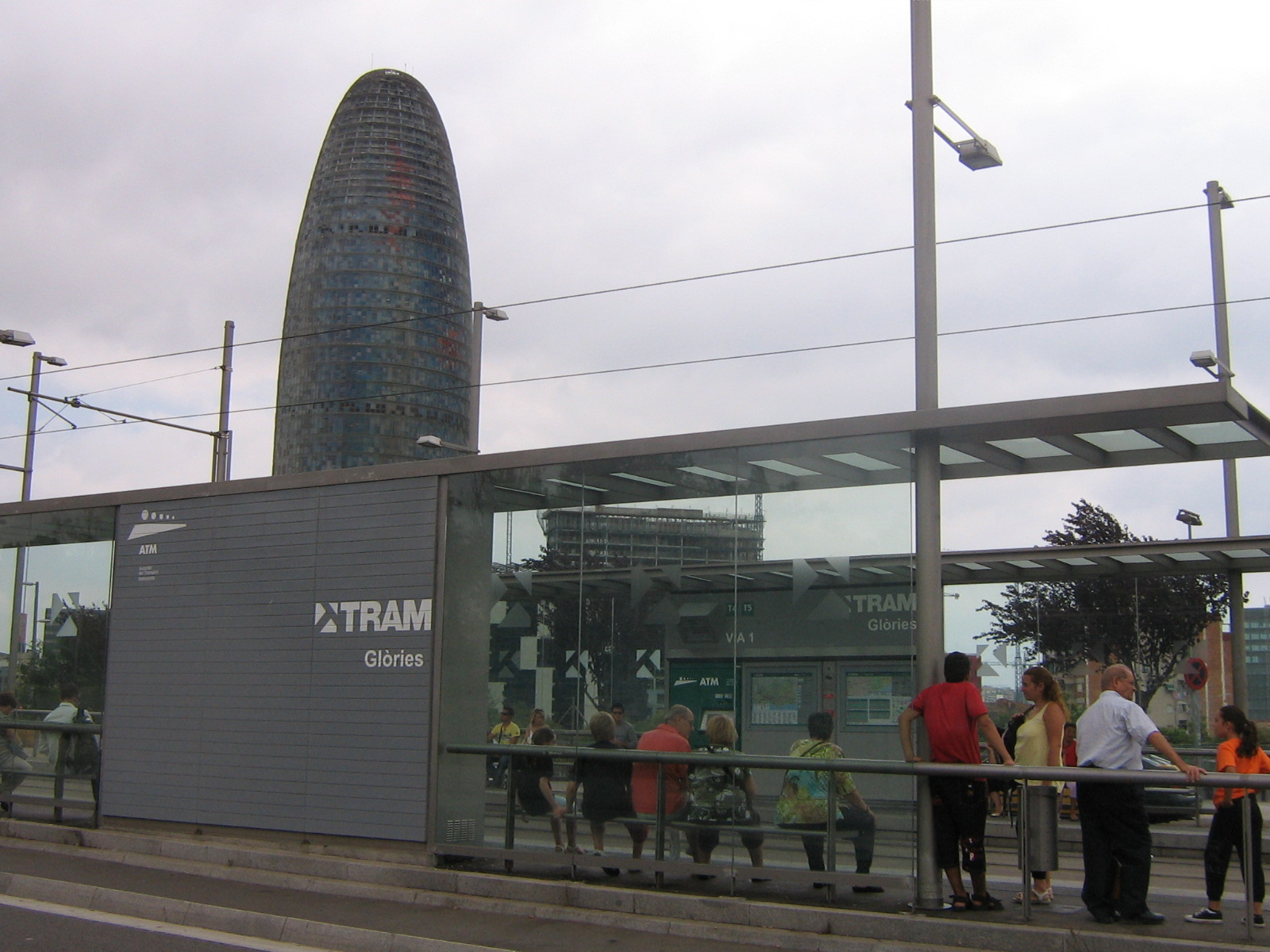 Estación de Trambesòs de Glòries (Barcelona)